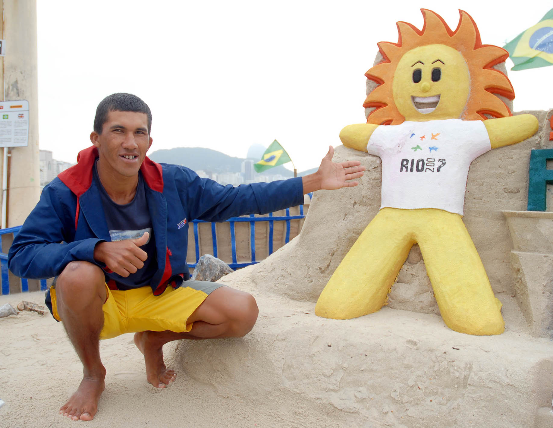 Rio de Janeiro - O escultor Danilo Rodrigues Marques e escultura retratando o mascote dos Jogos Panamericanos de 2007, Cauê, na areia da Praia de Copacabana.